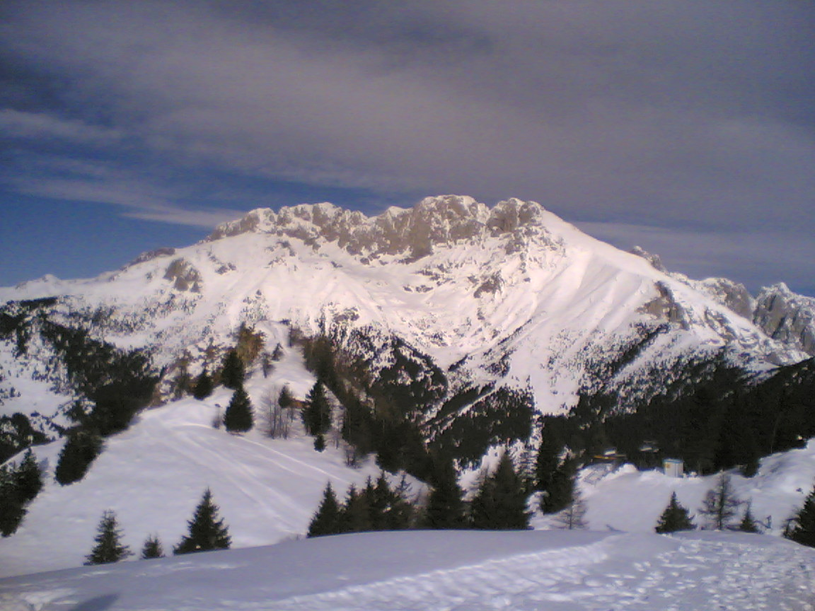 La parete sud della presolana: Da sinistra a destra, le maggiori cime del gruppo: la Presolana di Castione (2474m), la Presolana Occidentale (2521m), la Presolana Centrale (2517 m), la Presolana Orientale (2490 m) e il Monte Visolo (2370 m), appena più a destra della Cima Orientale. In primo piano rispetto alla cima Occidentale: il Pizzo di Corzene (2012 m), mentre sono appena visibili, sulla destra, le Quattro Matte (2122m). La foto è stata scattata dal Monte Scanapà